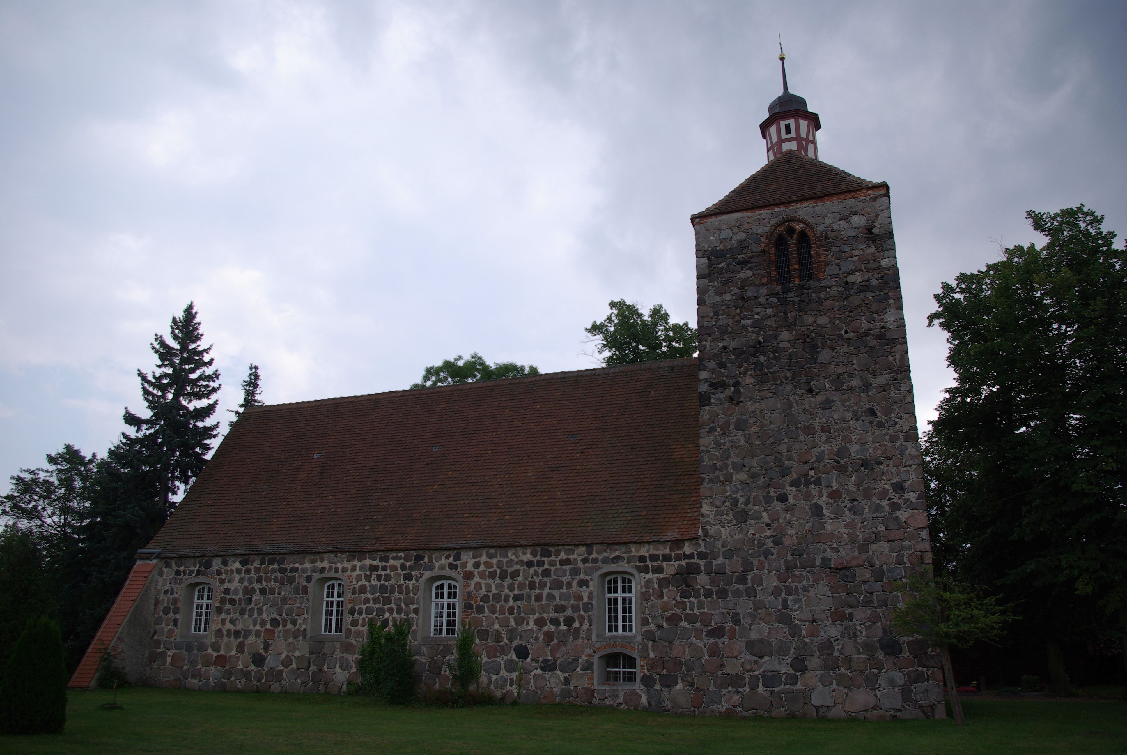 Luckenwalde in Brandenburg. Die Kirche im Ortsteil Frankenfelde steht unter Denkmalschutz.